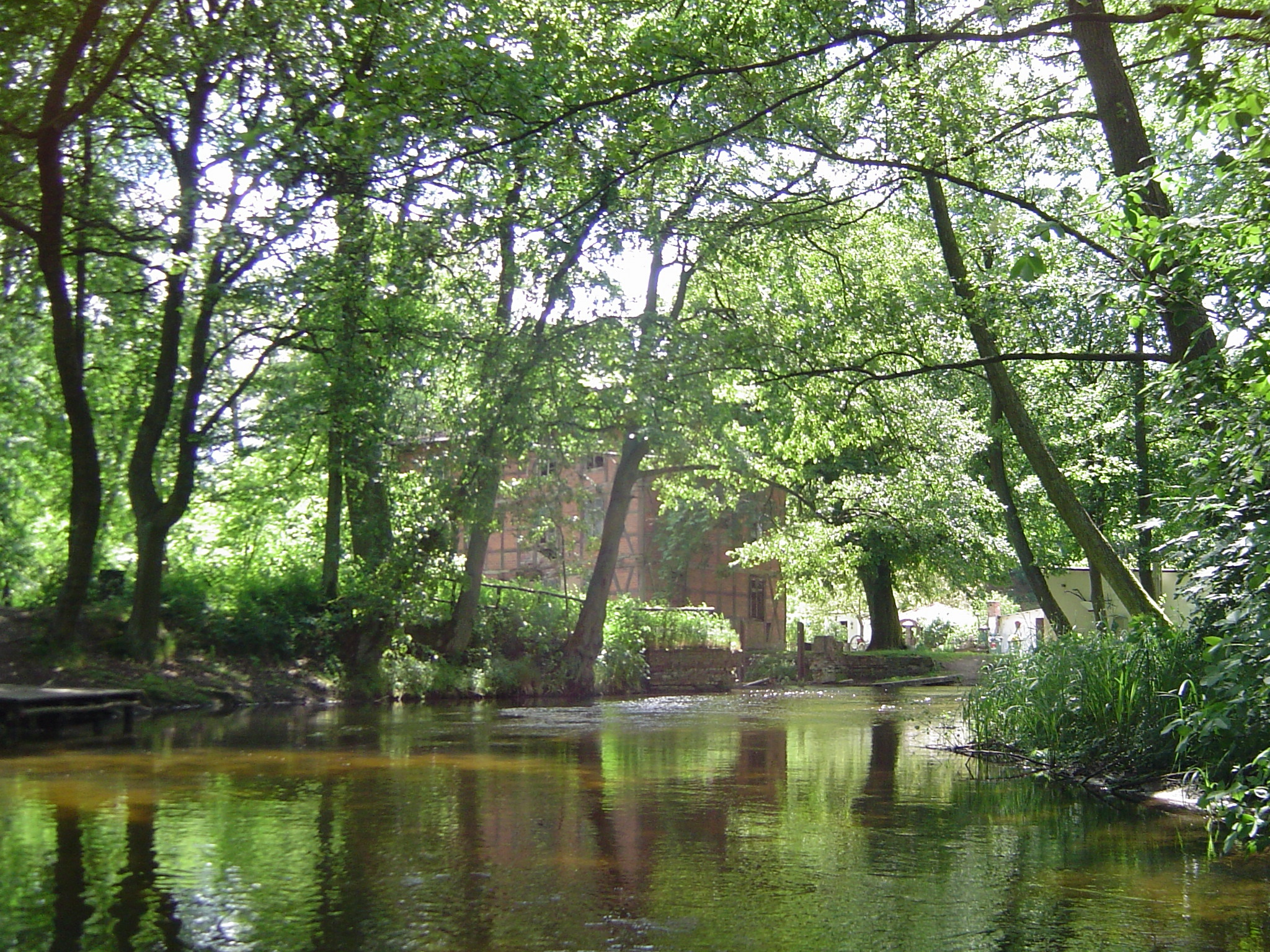 Młyn wodny w Głeboczku (zachodniopomorskie) na rzece Redze.